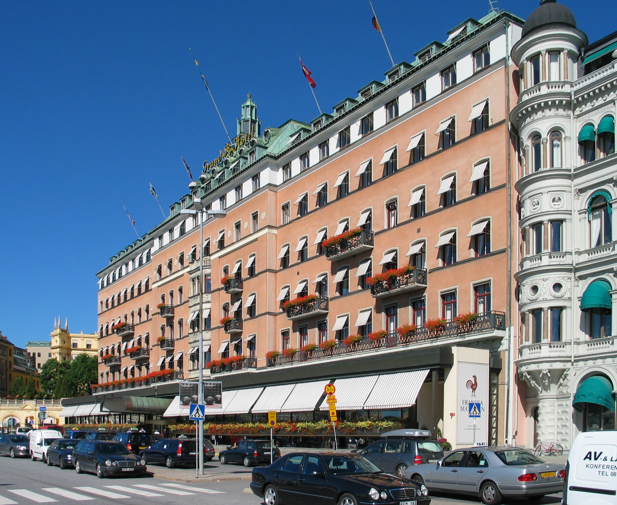 Grand Hôtel, Stockholm, Sweden.